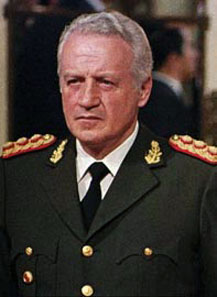 Fotografía de Leopoldo Fortunato Galtieri tomada y publicada en 1981, durante su asunción como presidente.